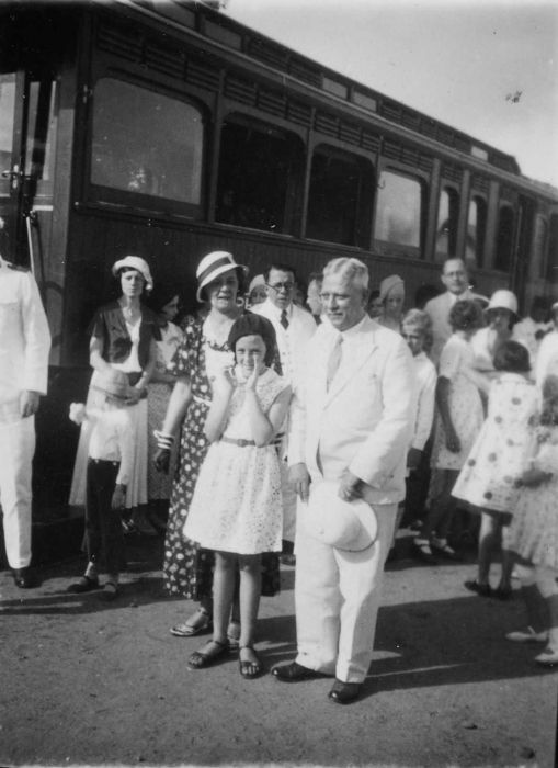 Foto. Vertrek resident J.L.M. Swaab van station Kertapati bij Palembang